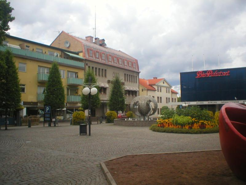 Foto av Sveatorget i Borlänge, taget av Per Johansson 2005.